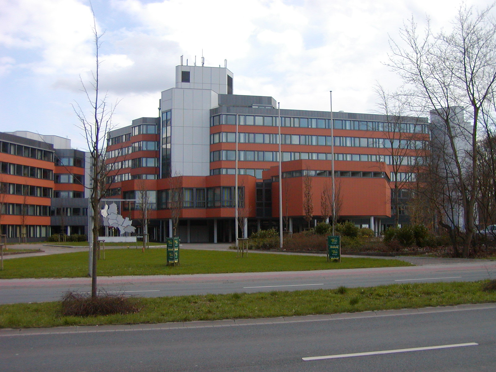 Das Kreishaus in Minden, Nordrhein-Westfalen, ist Sitz der Kreisverwaltung des Kreises Minden-Lübbecke. Im Vordergrund eine Skulptur in Form einer Karte: Sie zeigt das Kreisgebiet, das sich wiederu aus den Flächen der kreisangehörigen Gemeinden zusammensetzt. In der Skulptur fehlt jedoch (bzw. ist nicht zu sehen, da abgewinkelt) die Gemeinde Petershagen, die das Kreisgebiet im Nordosten abrundet.